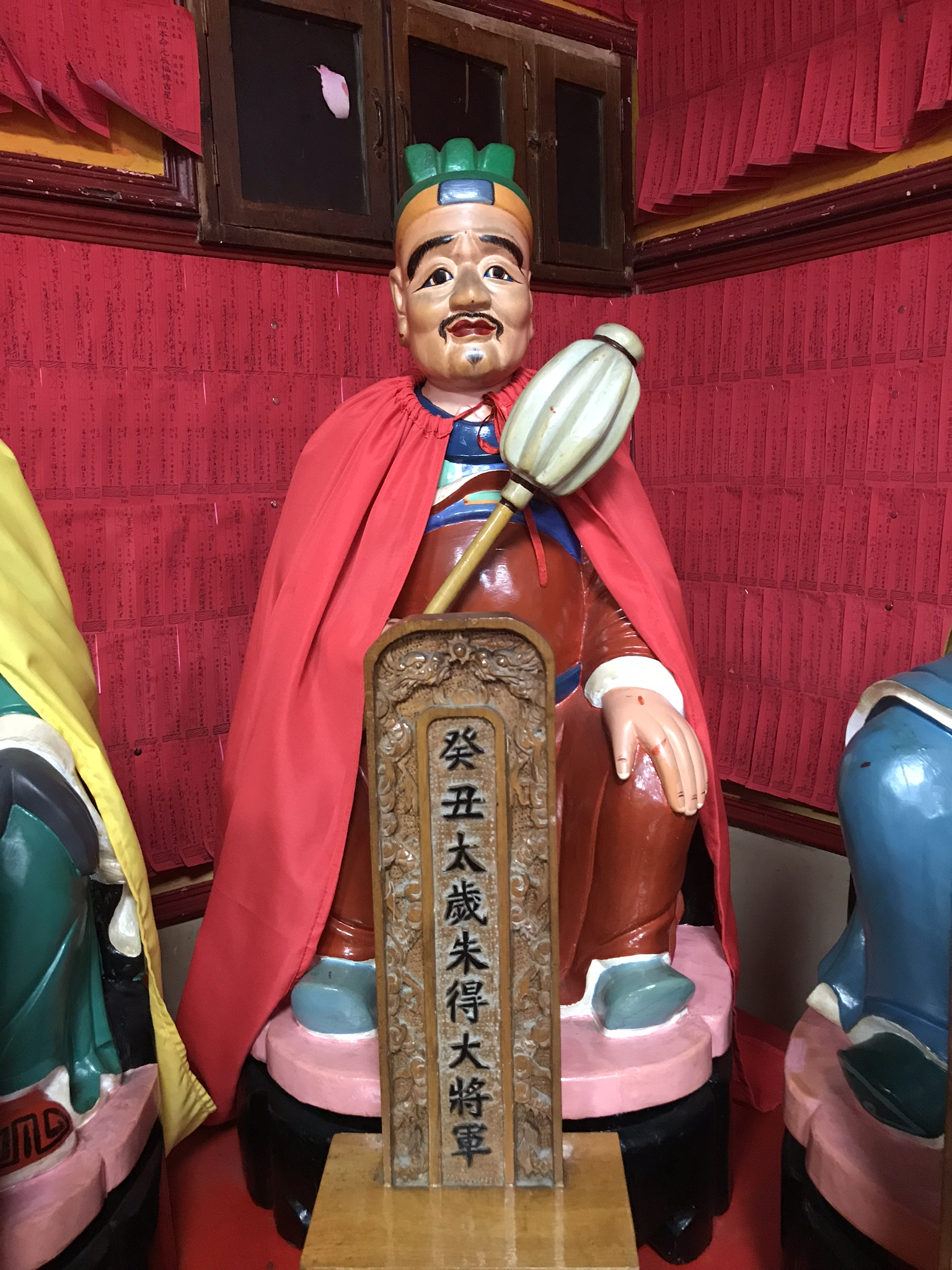 癸丑太歲朱得大將軍神像